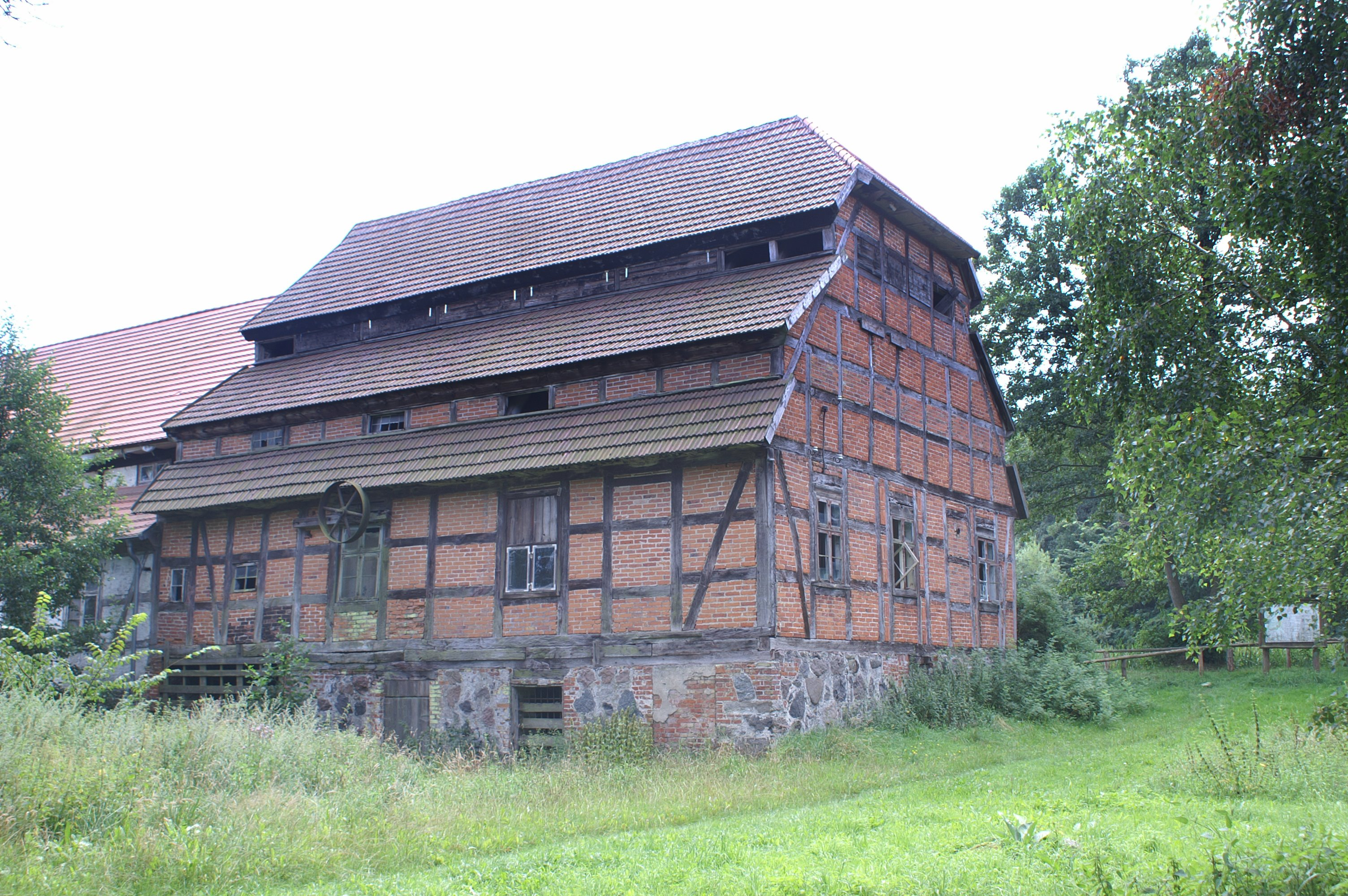 Wassermühle in Hanshagen, Landkreis Ostvorpommern